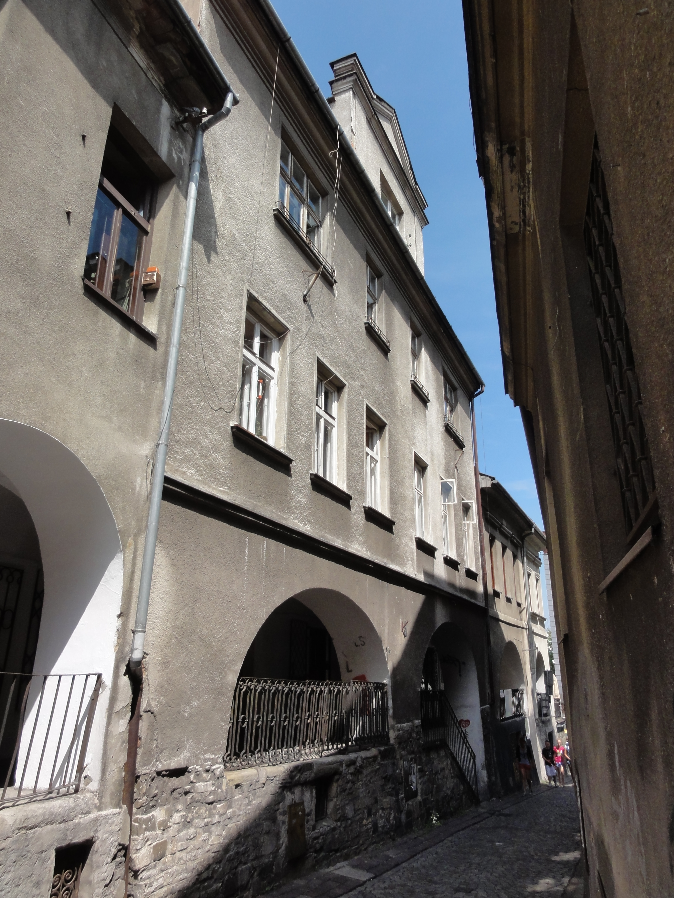 Bielsko-Biała, ul. Podcienie 11